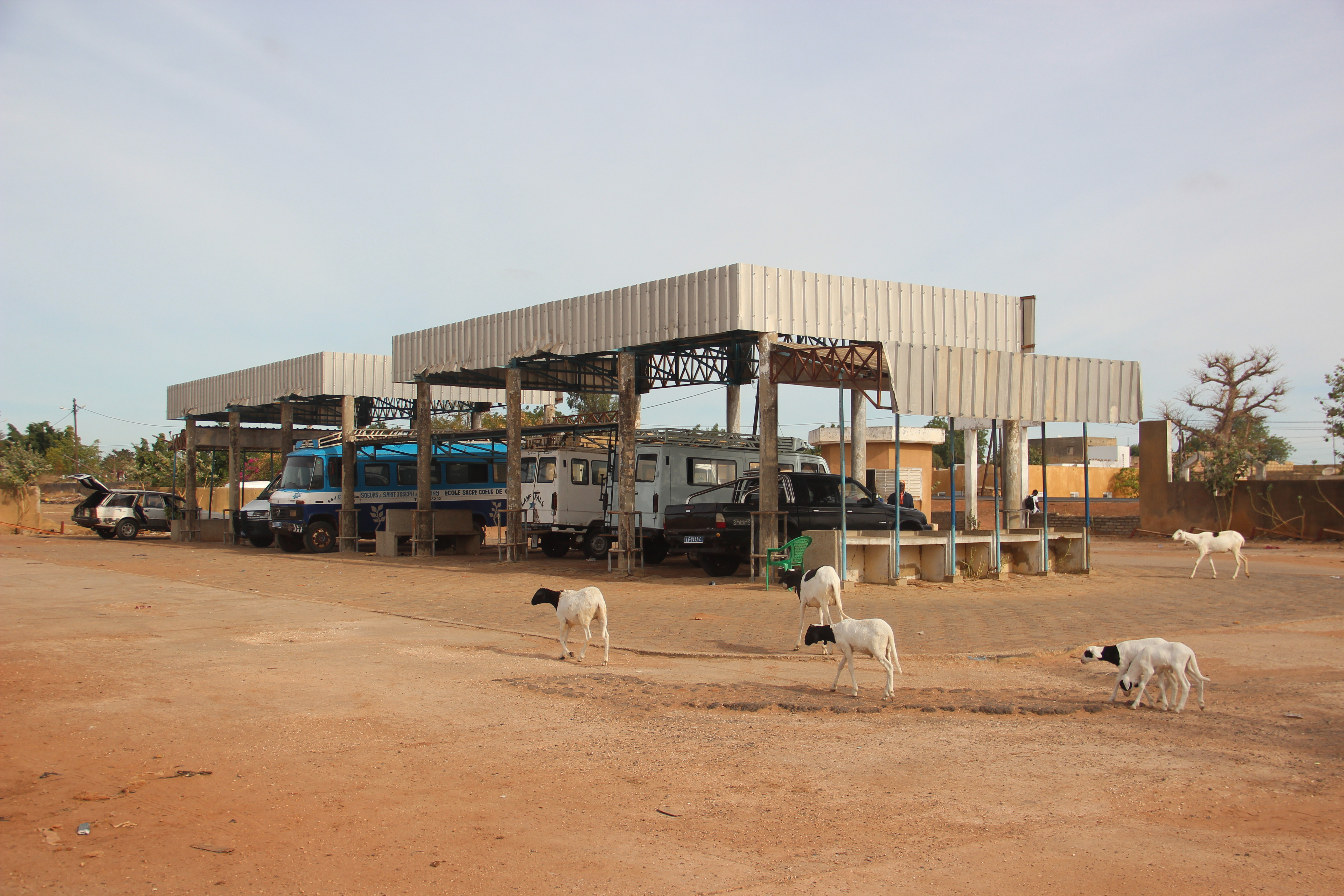 Gare routière de Gandiaye (Sénégal). This is an image with the theme "Africa on the Move or Transport" from: Senegal